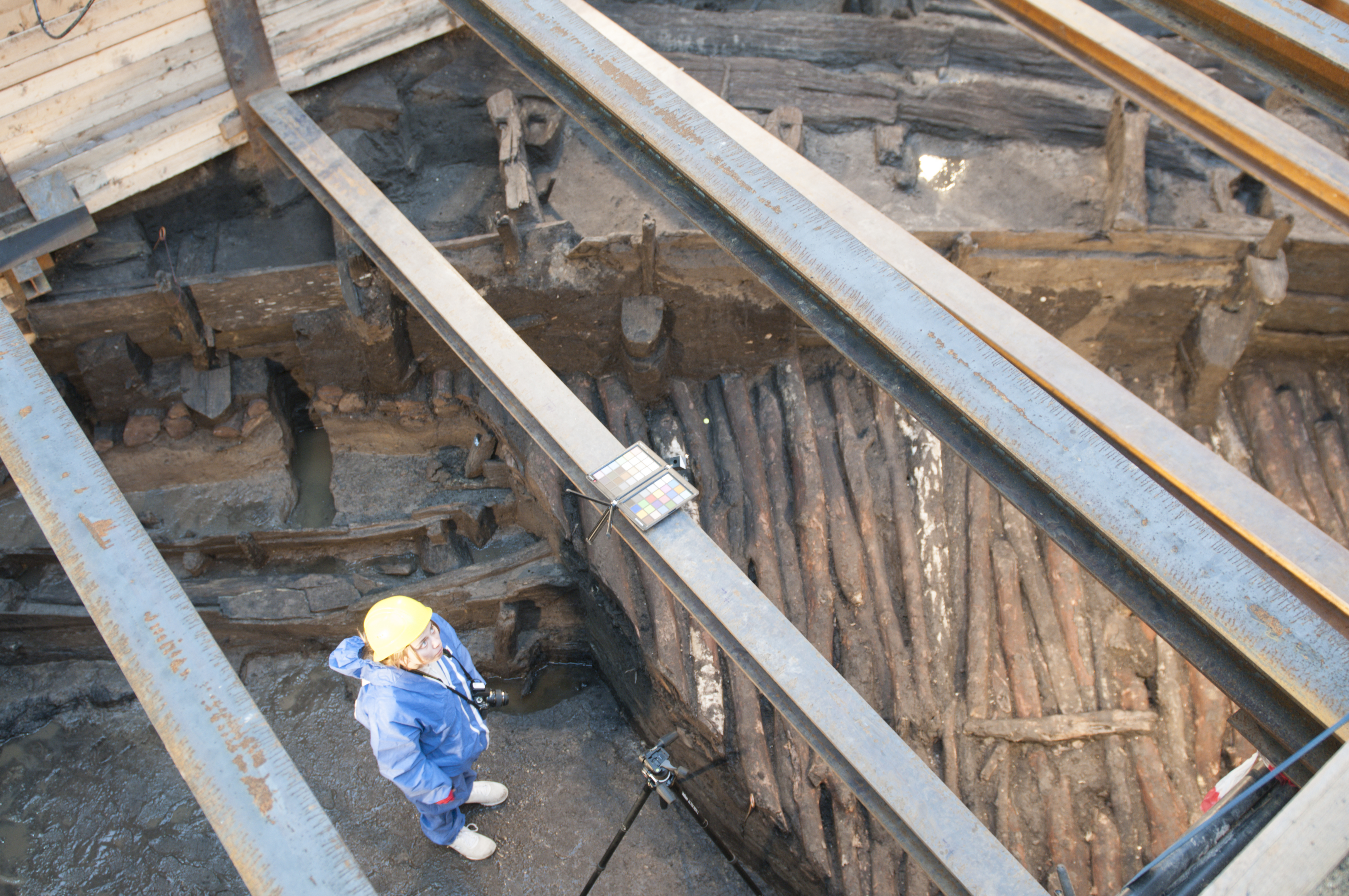 Ausgrabungen Slawischer Burgwall im Schweriner Schloß 2014